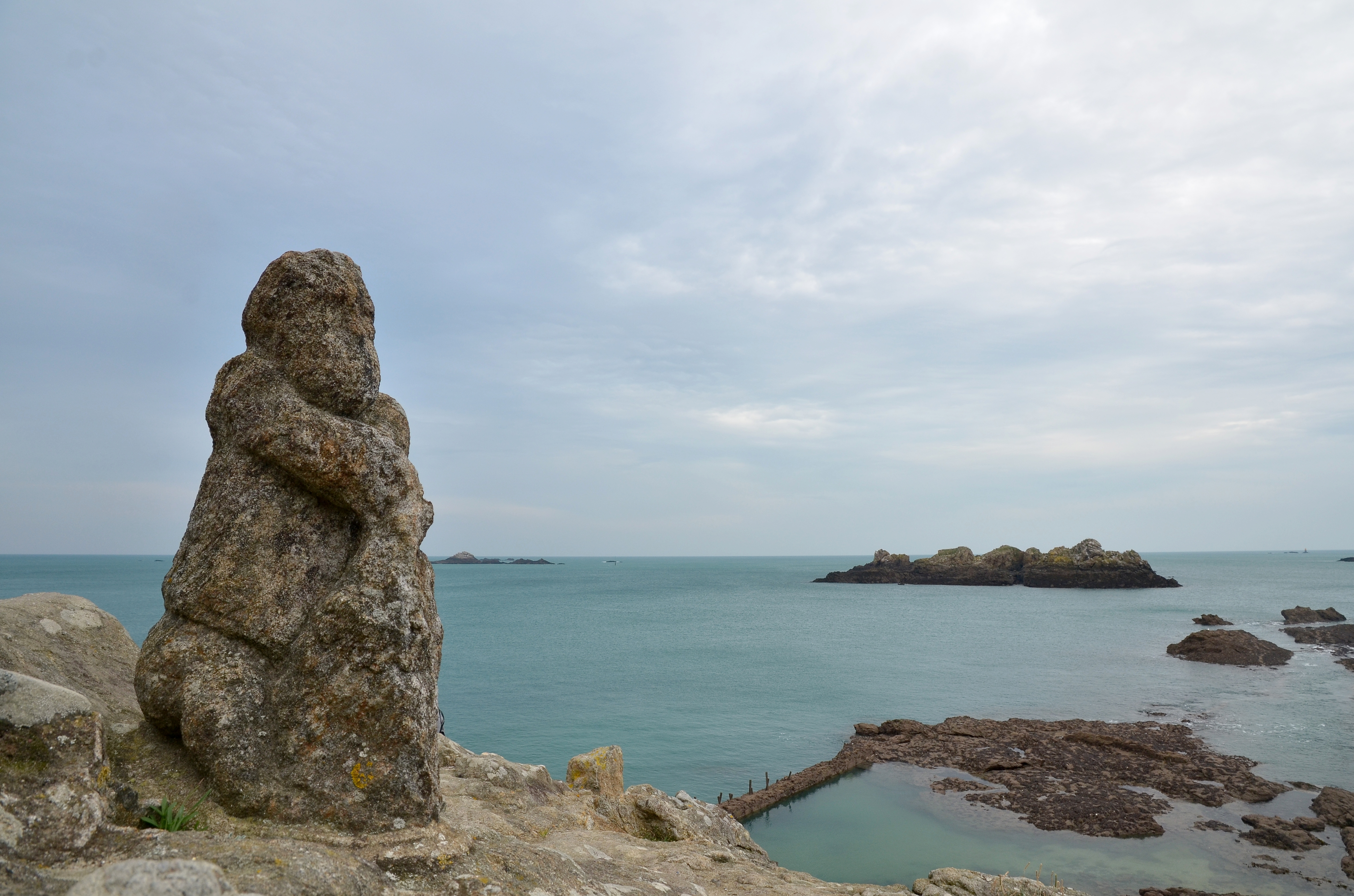 Rochers sculptés de Rothéneuf, Bretagne, France